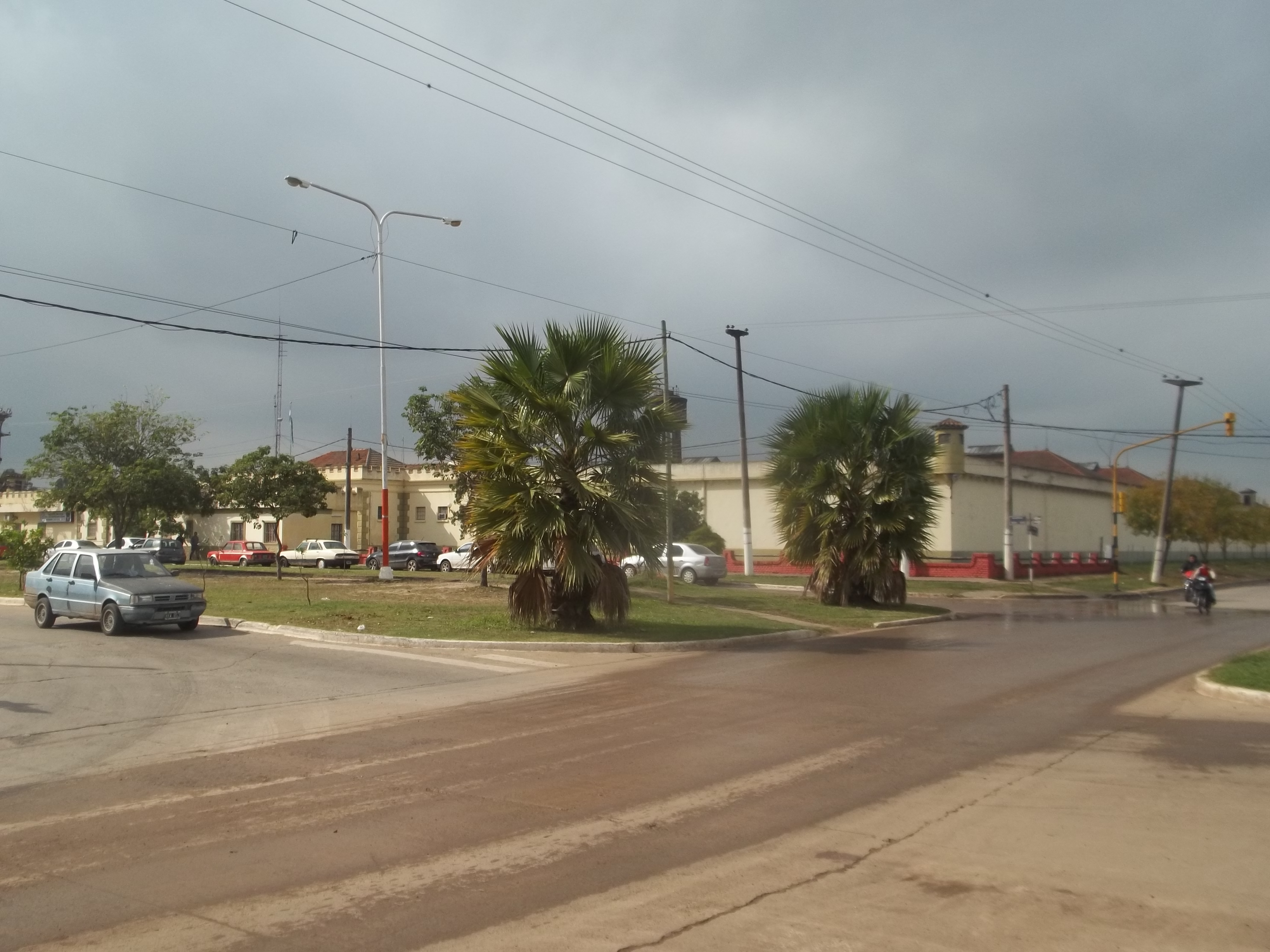 Vista de la Unidad Penitenciaria Federal 7 desde la intersección de las avenidas Las Heras y Édison.